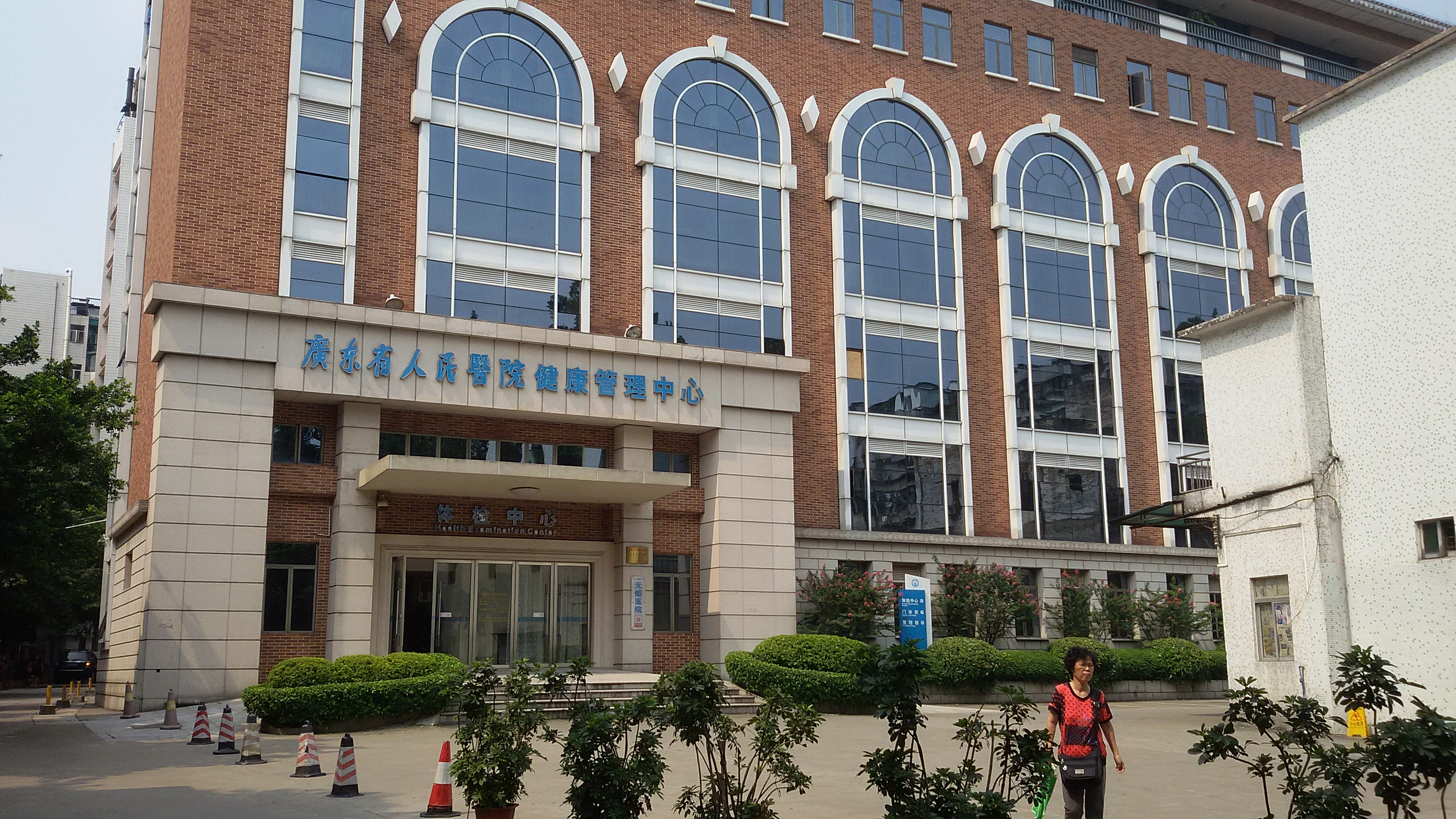 粵語: 廣東省人民醫院嘅惠福分院